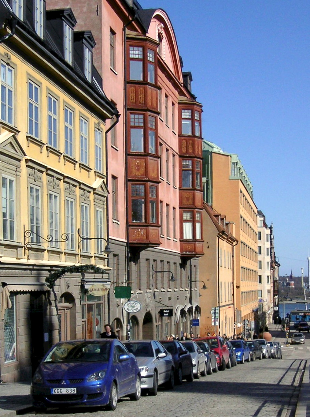 Hornsgatspuckeln med Hornsgatan 26 i mitten